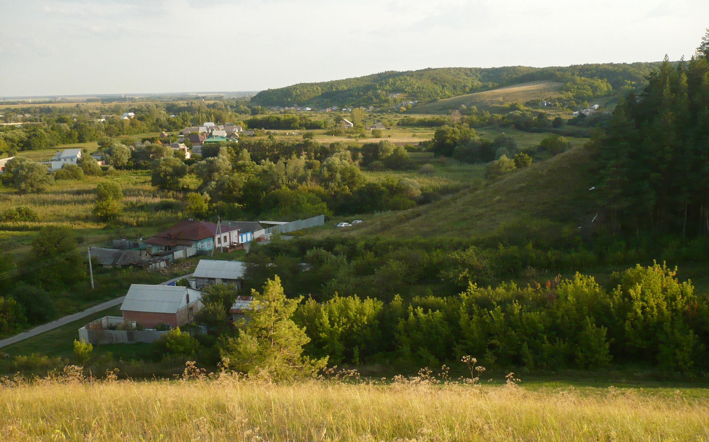 Село Дмитриевка. Шебекинский район Белгородской области.